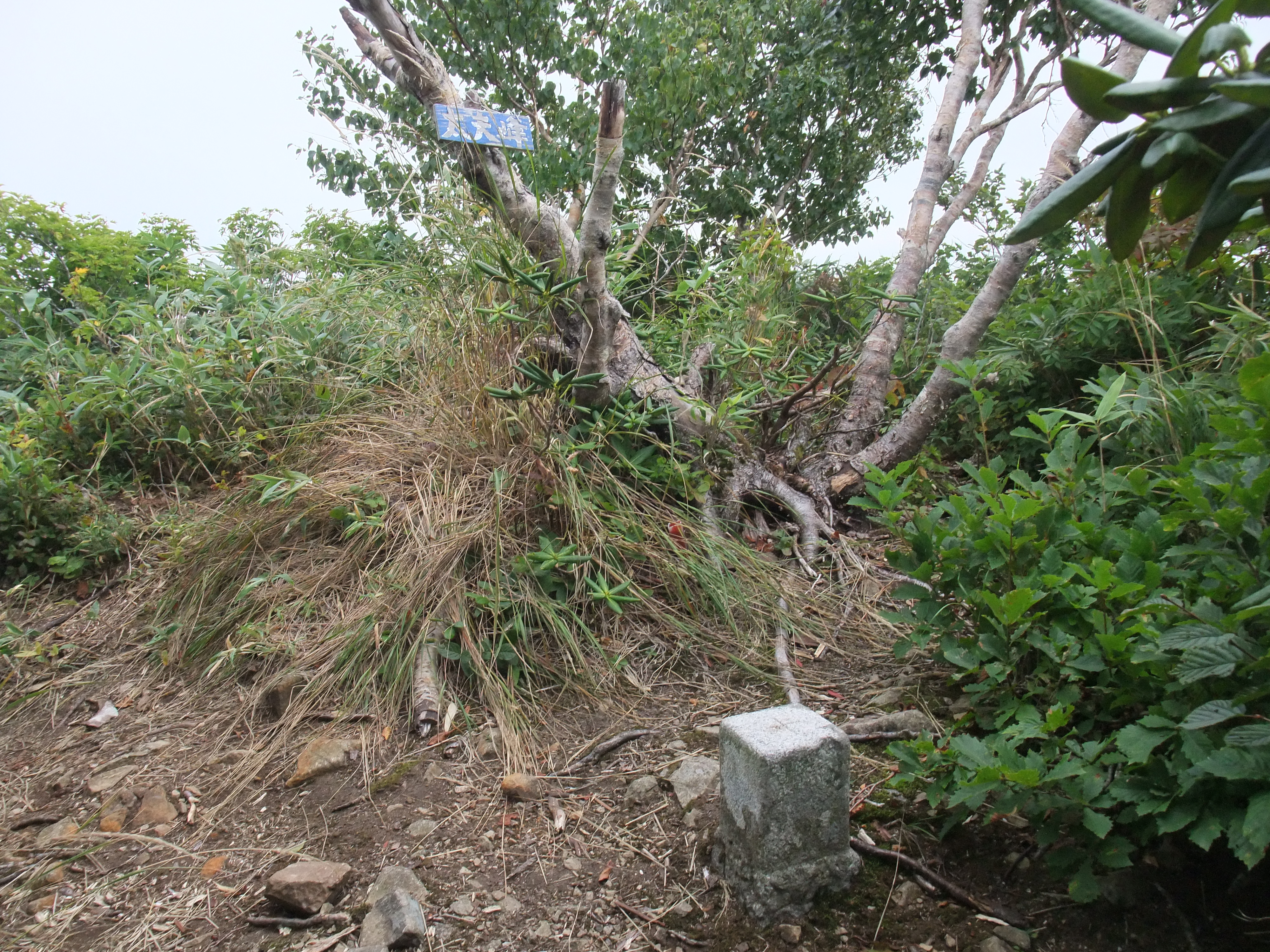 白神産地 太夫峰山頂